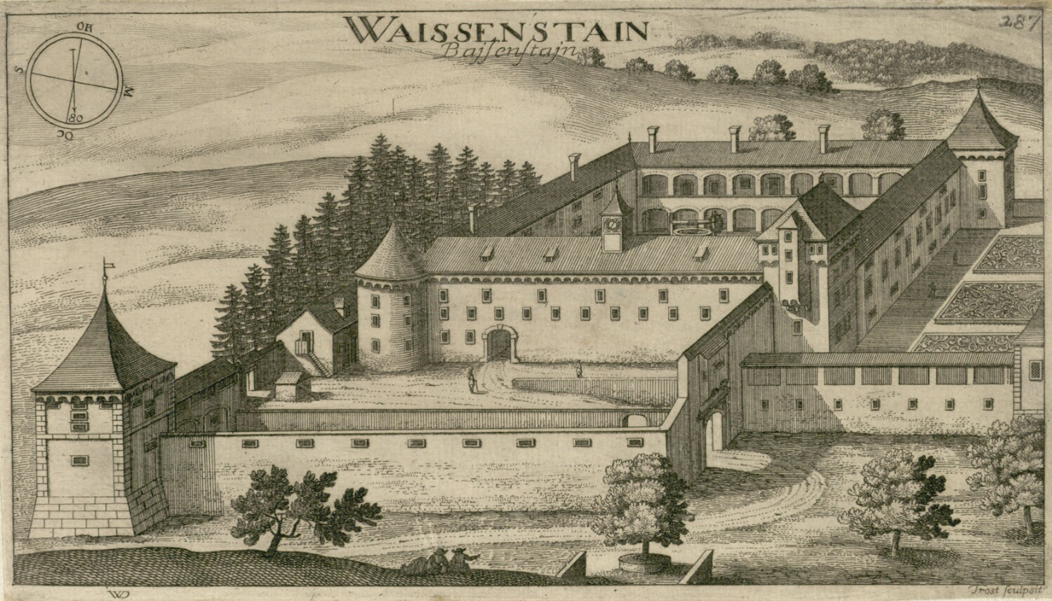 Grad Boštanj